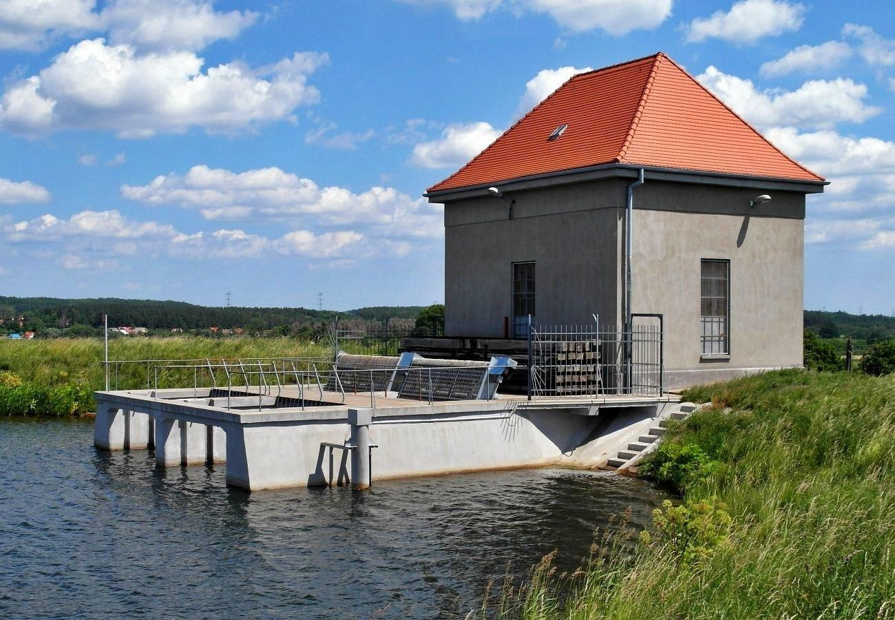 Zamek Wodny na zbiorniku Kolbudy II.